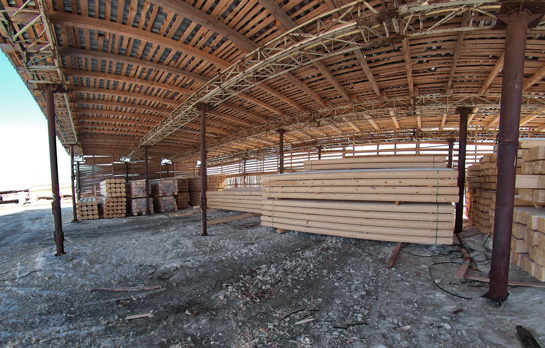 Естественная сушка пакетов из оцилиндрованного бревна под навесом